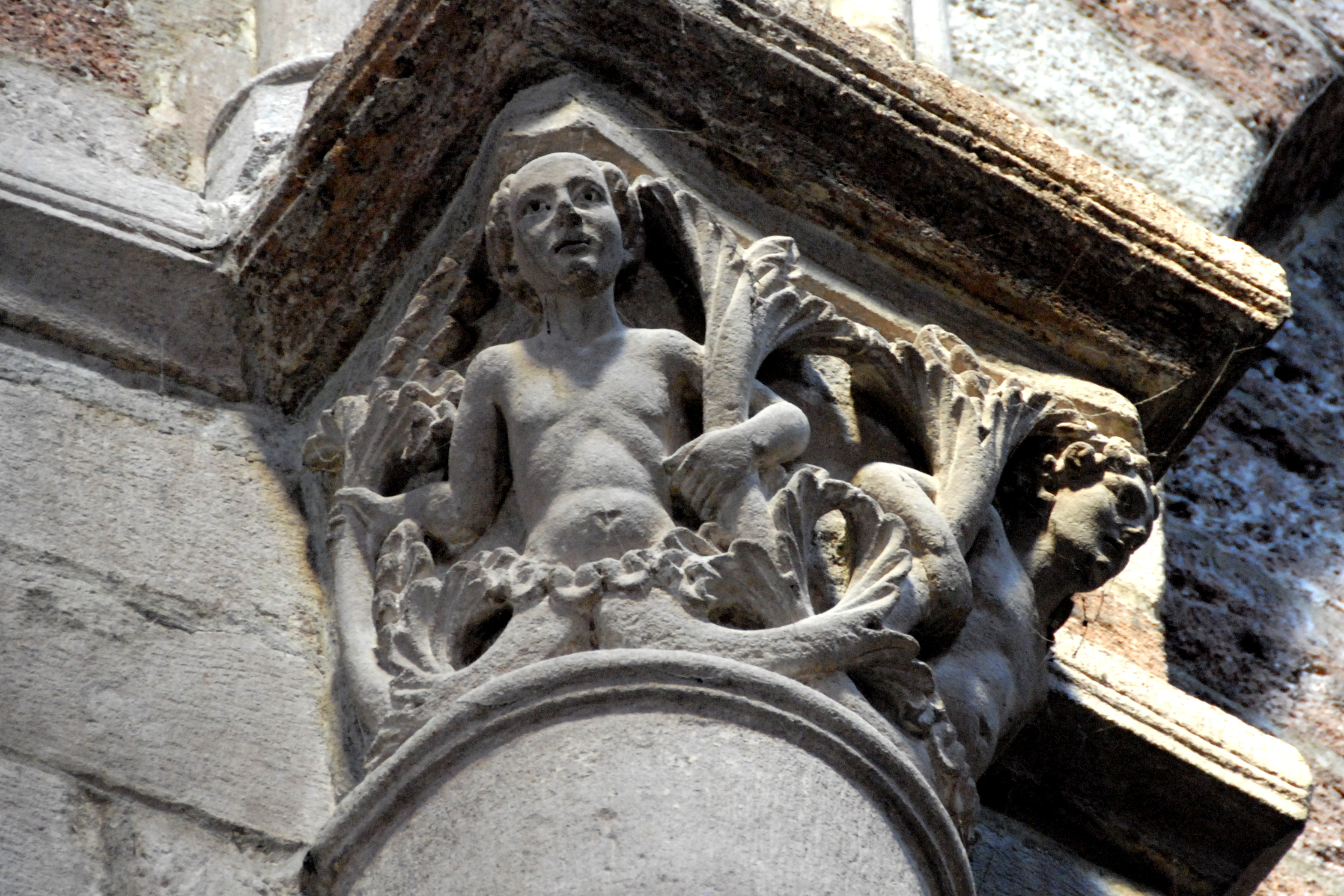 St.-Julien Brioude, Kapitell, Tritonen mit geteilten Schweifen